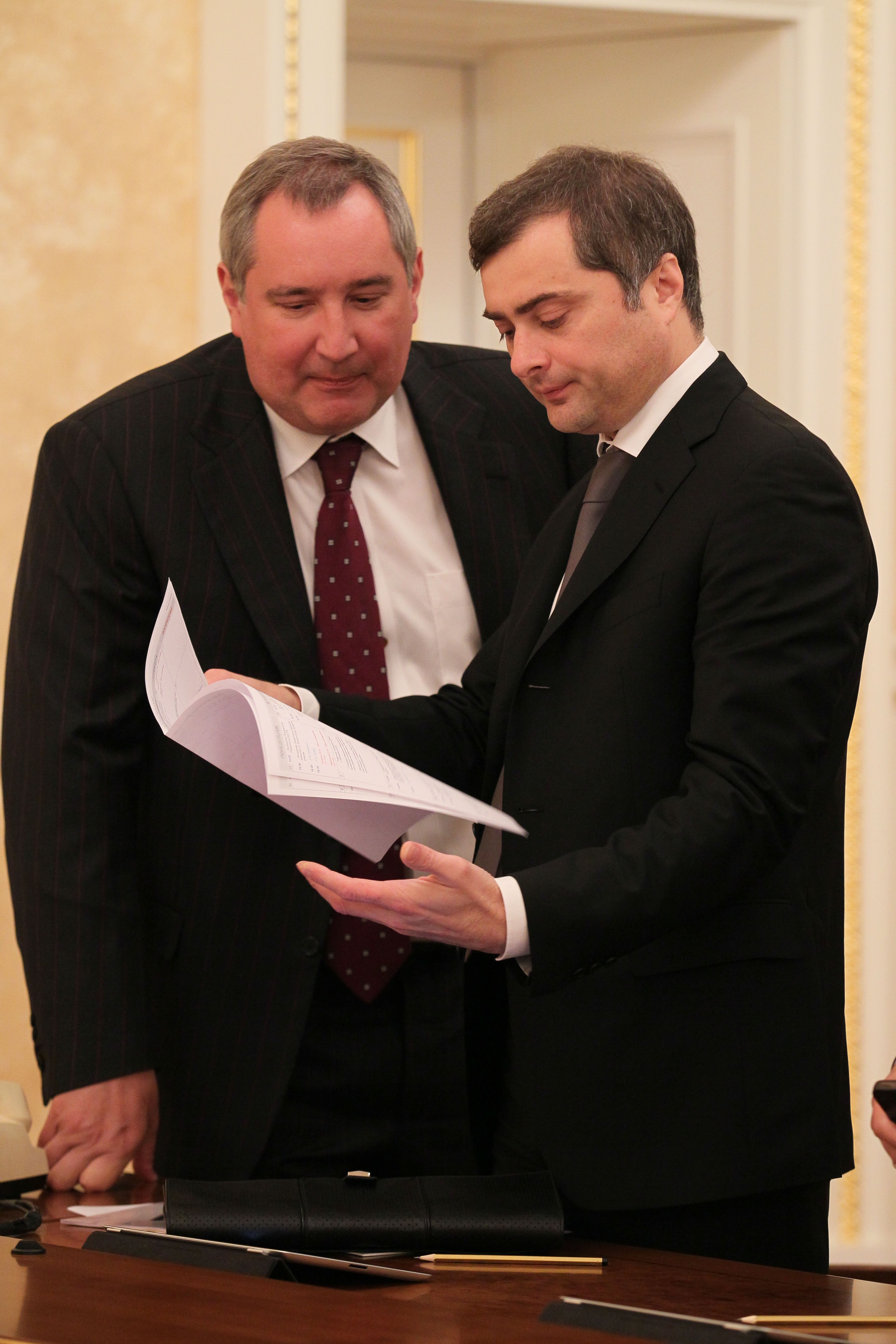 Заместитель Председателя Правительства Российской Федерации Дмитрий Рогозин и заместитель Председателя Правительства Российской Федерации — Руководитель Аппарата Правительства Российской Федерации Владислав Сурков перед заседанием Президиума Правительства Российской Федерации